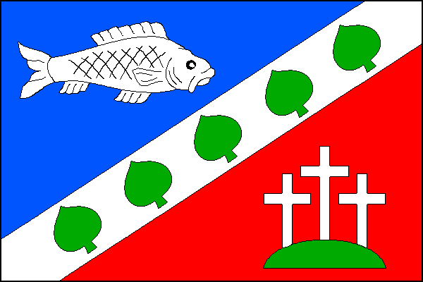 vlajka, Čestice, okres Strakonice